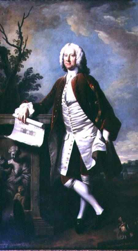 Porträt des Architekten Theodore Jakobsen († 1772)